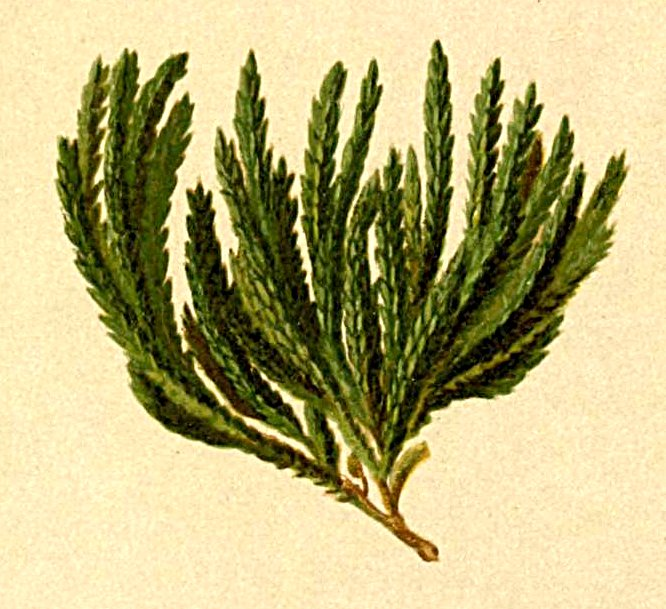 Lycopodium alpinum (Diphasiastrum alpinum)